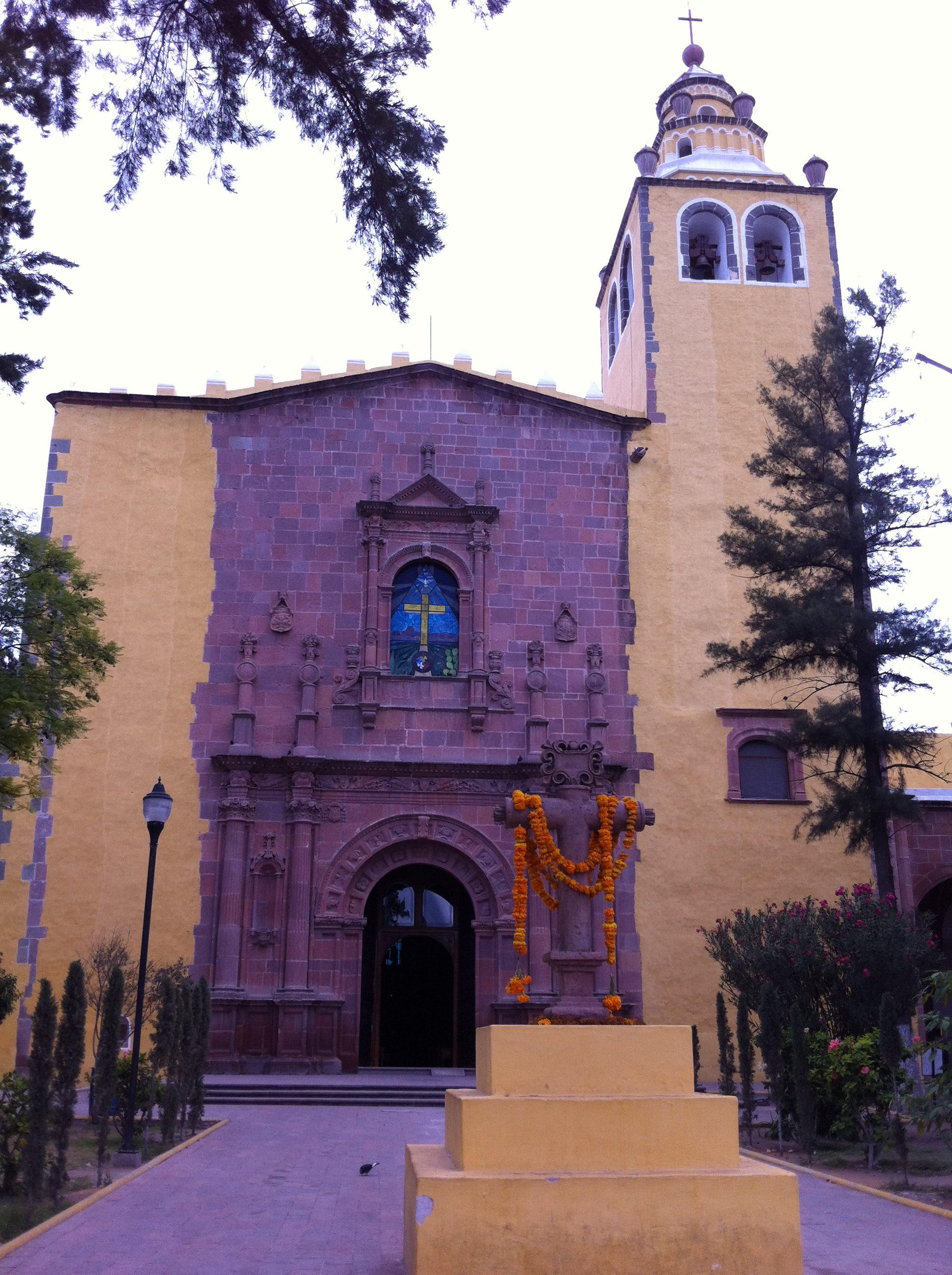 Templo y Ex Convento de San Miguel Arcángel